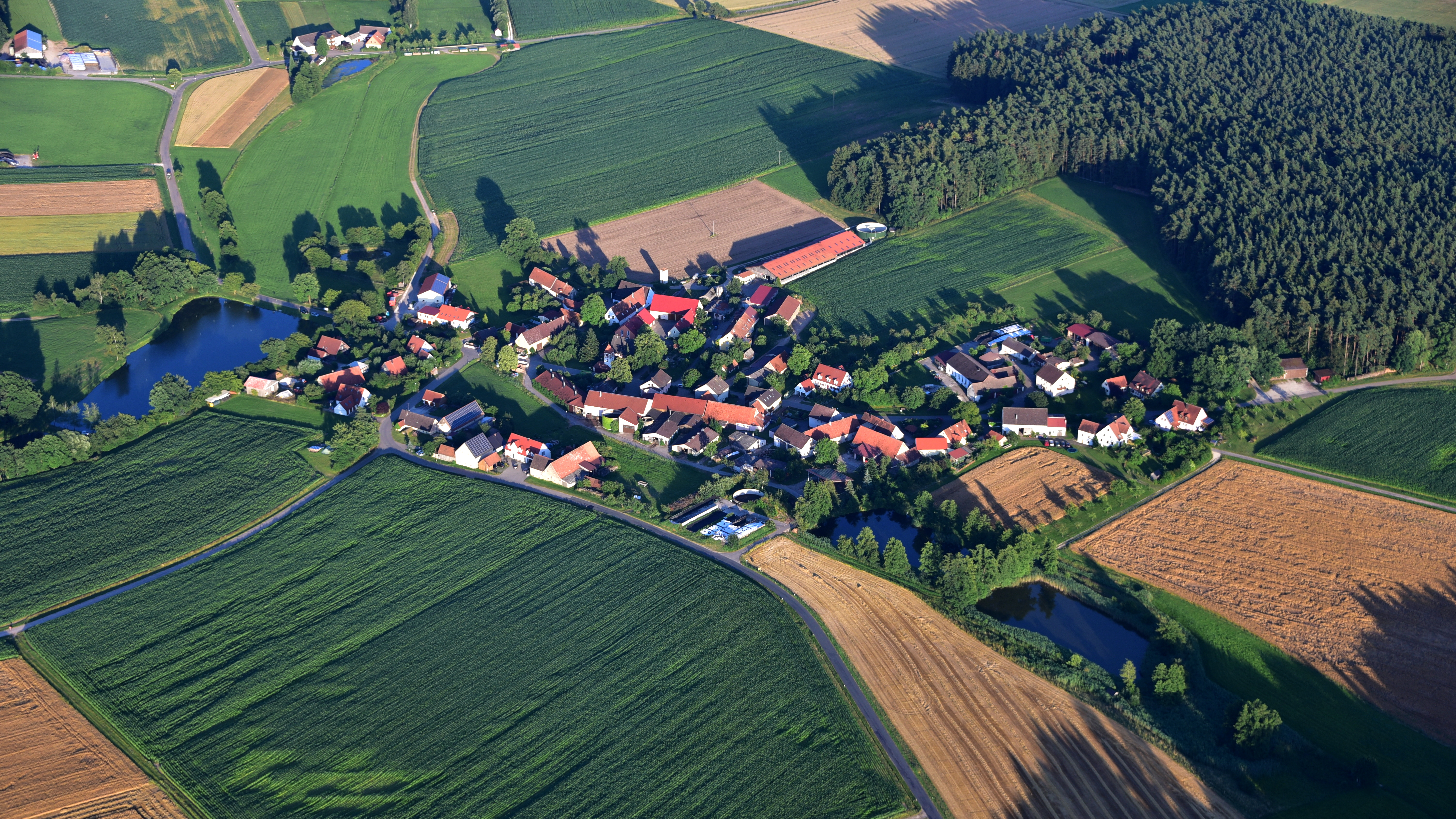 Unterhambach, Luftaufnahme (2016)